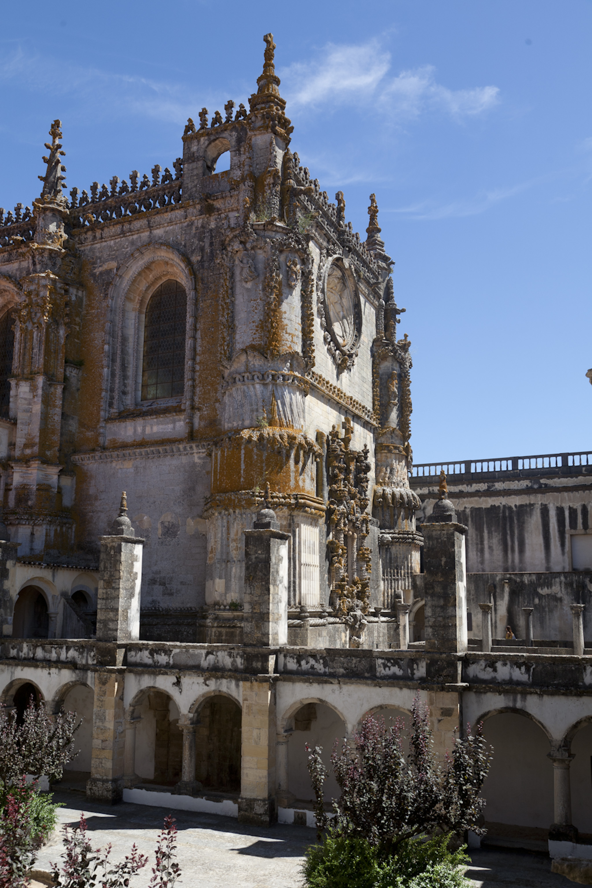 Claustro da Hospedaria e fachadas norte e ocidental da Igreja manuelina, Convento de Cristo